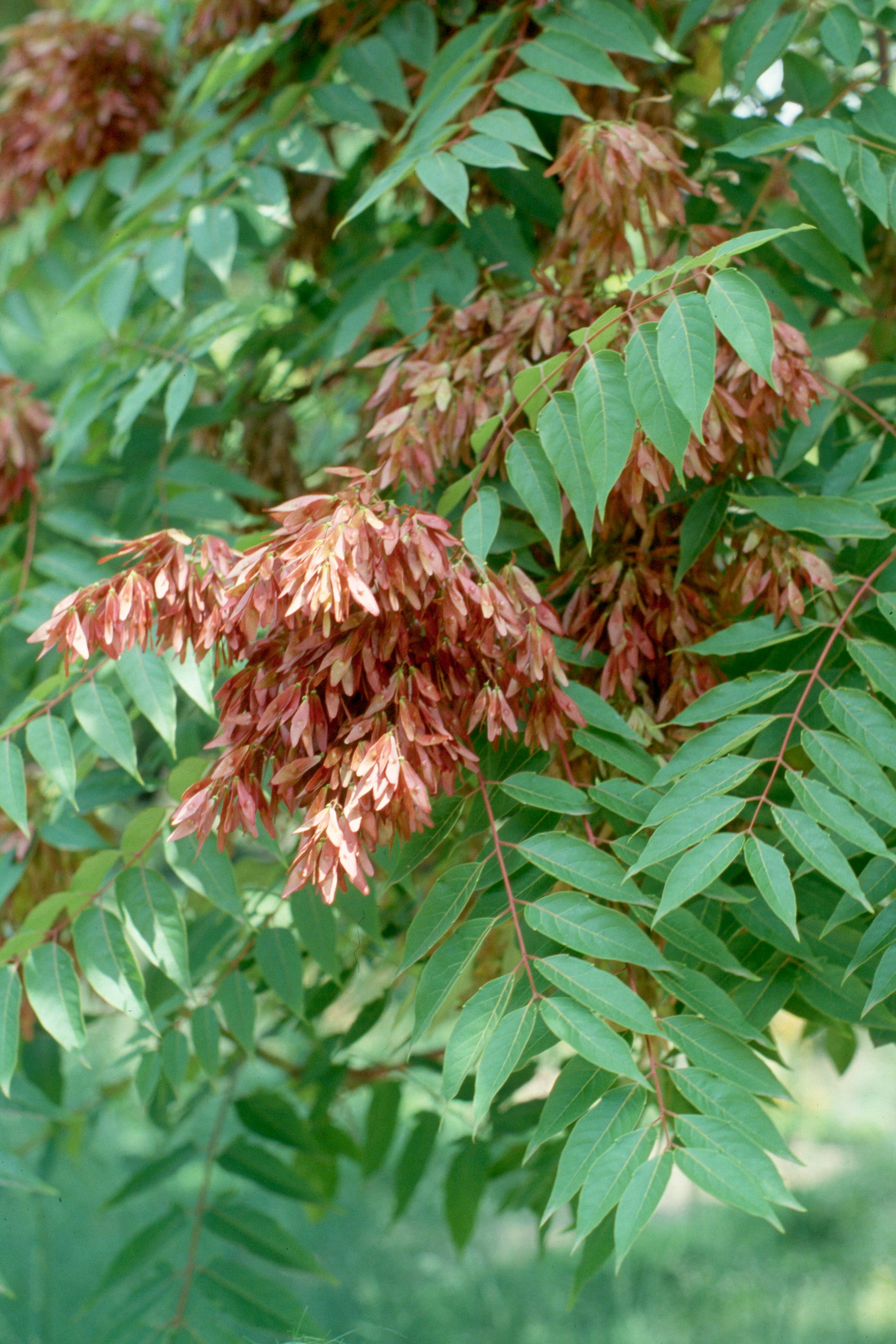 Ailanthus altissima, frutos. Real Jardín Botánico, Madrid.